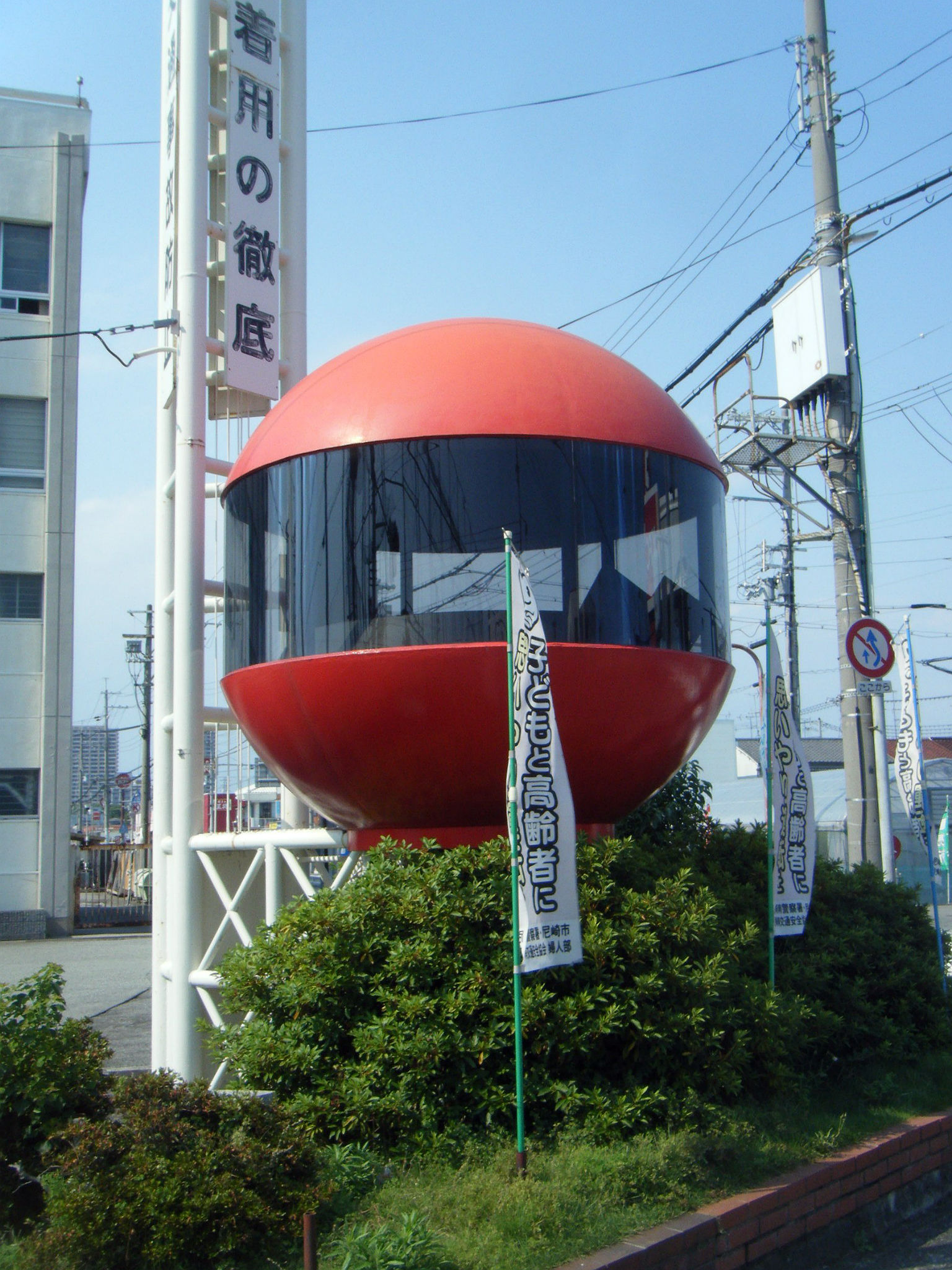 交通安全祈念塔 兵庫県 尼崎南警察署西分庁舎